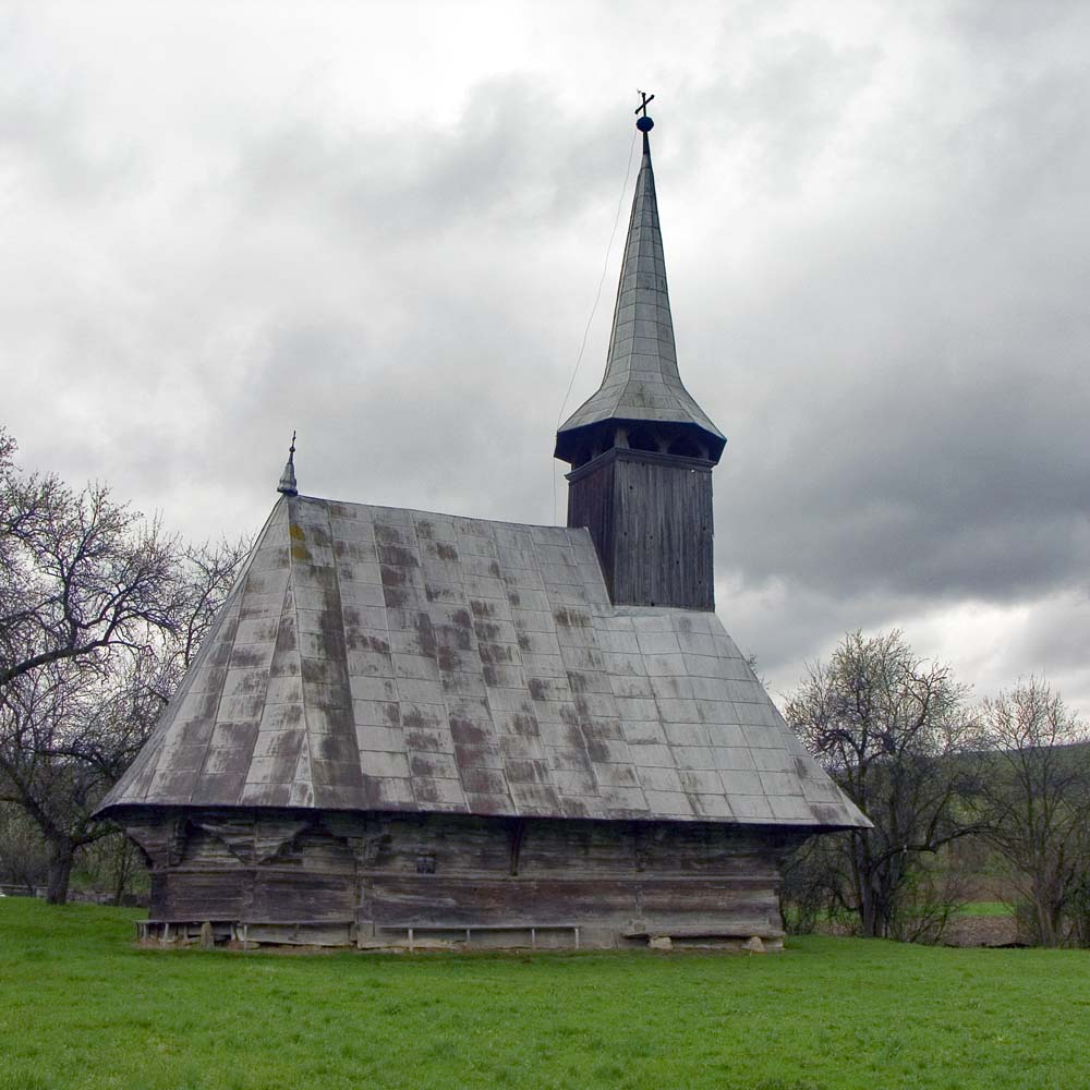 Biserica de lemn din Bălan Josani, dinspre miazănoapte.